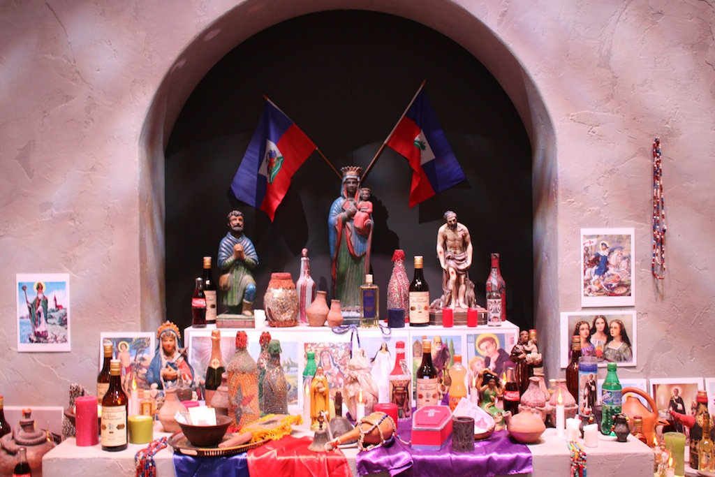 voodoo altar